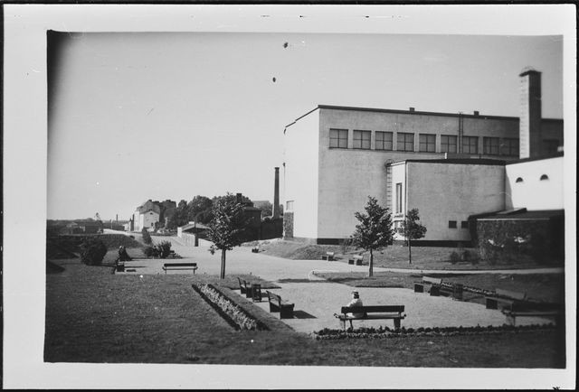 Viipurin taidemuseo